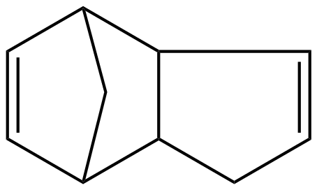 Structuur van dicyclopentadieen (DCPD)